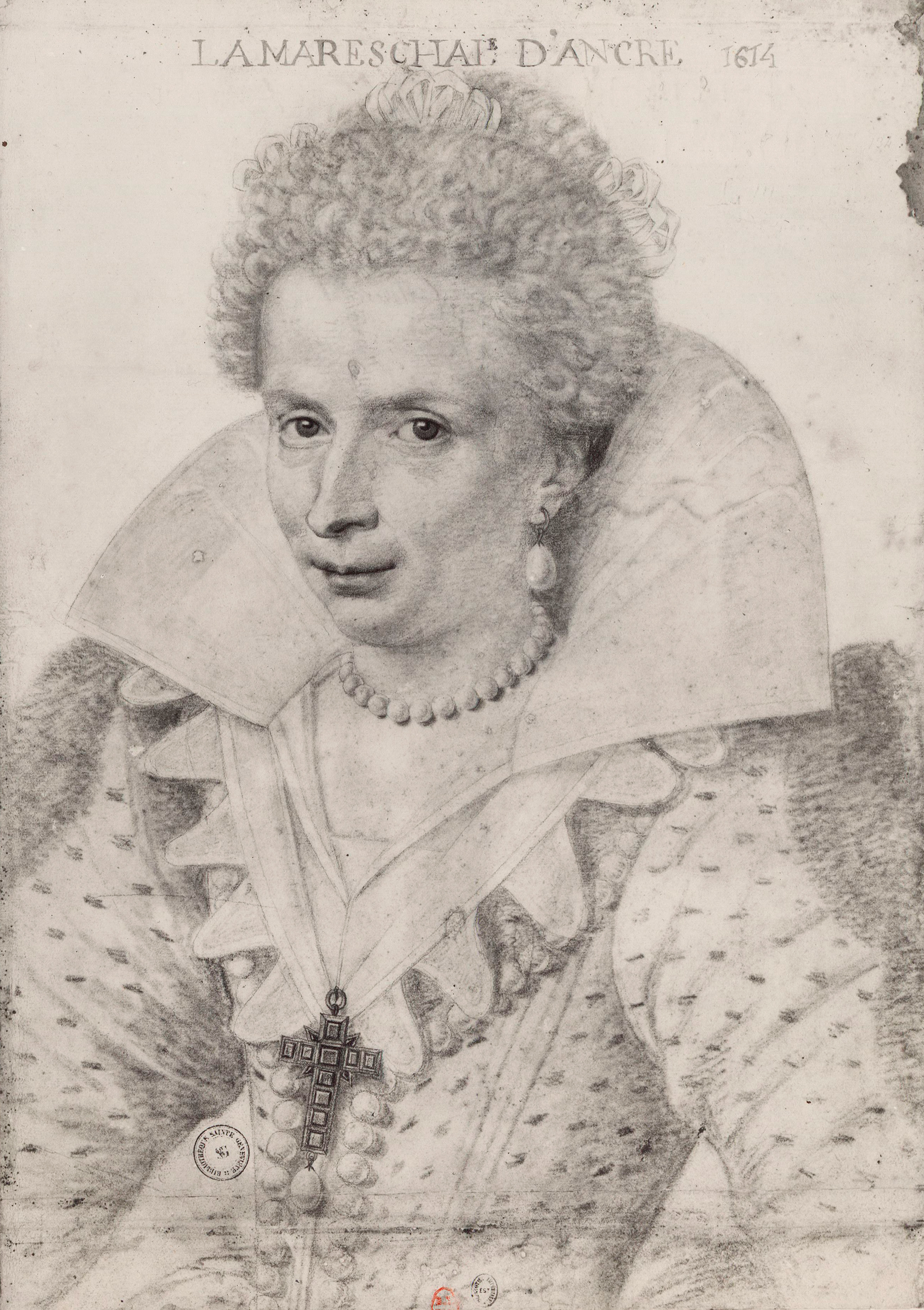 Léonora Dori, dite Galigaï, la maréchal d'Ancre.